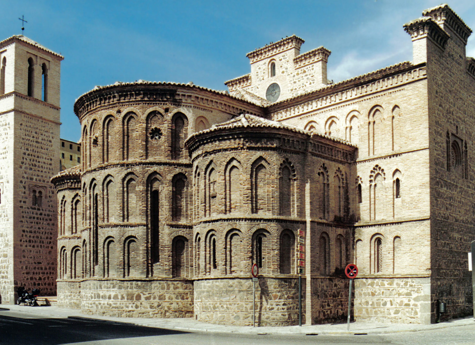 Chevet de l'église gothico-mudéjare Santiago del Arrabal à Tolède